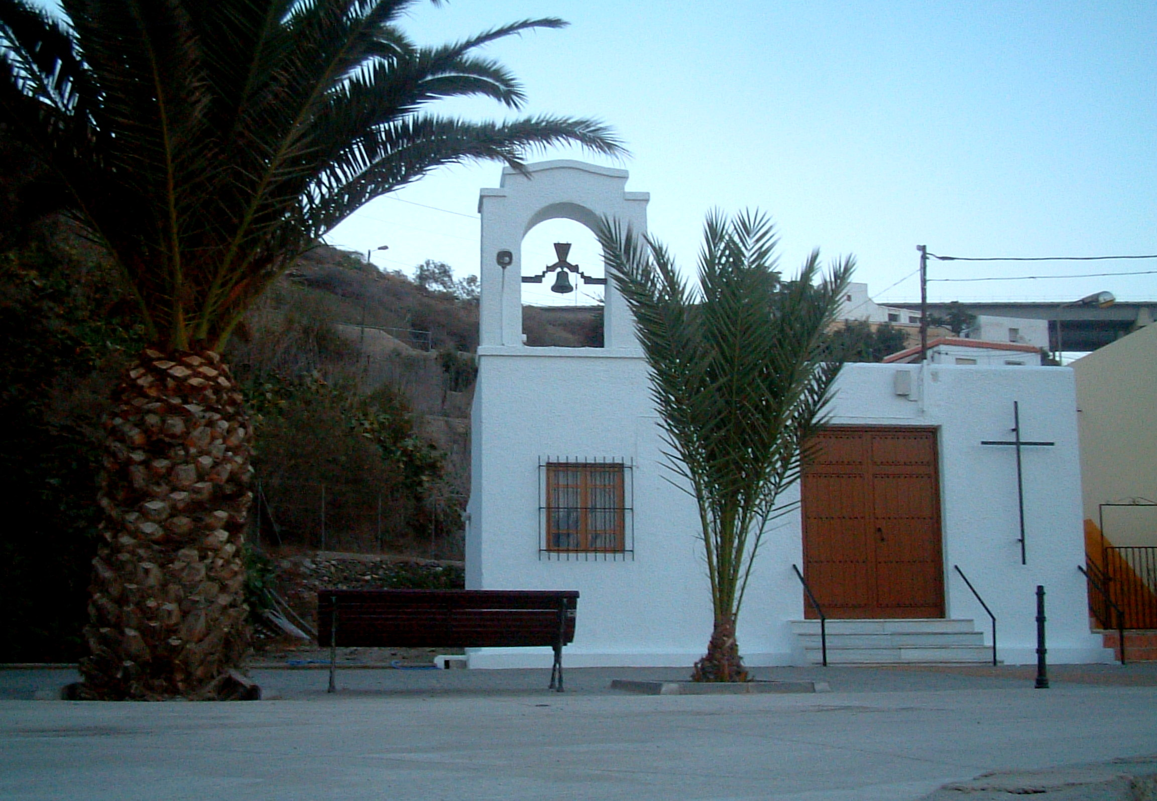 Ermita de Guainos